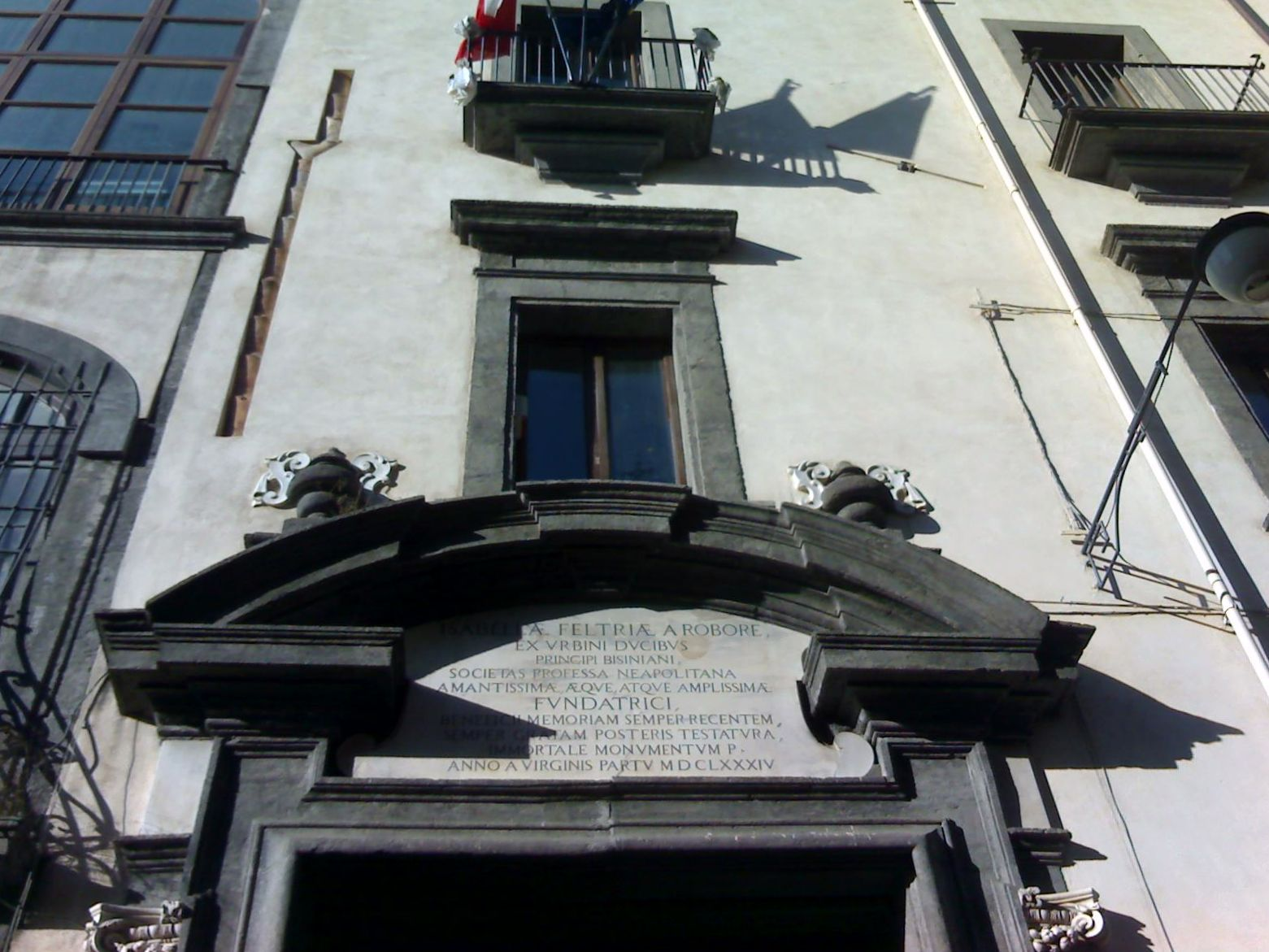 Particolare del portale d'ingresso all'Istituto Fonseca di Napoli